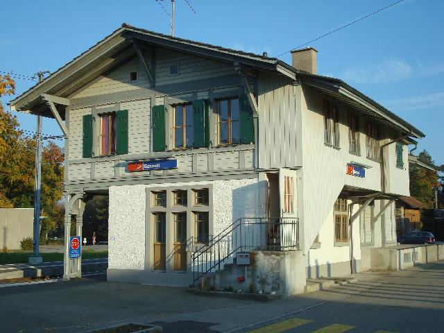 Historisches Stationsgebäude Bannwil der Aare Seeland mobil (ASm) auf der Strecke Langenthal - Niederbipp (- Oensingen) mit Baujahr 1907.